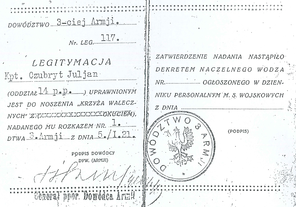 Legitymacja nadania Krzyża Walecznych str. 2